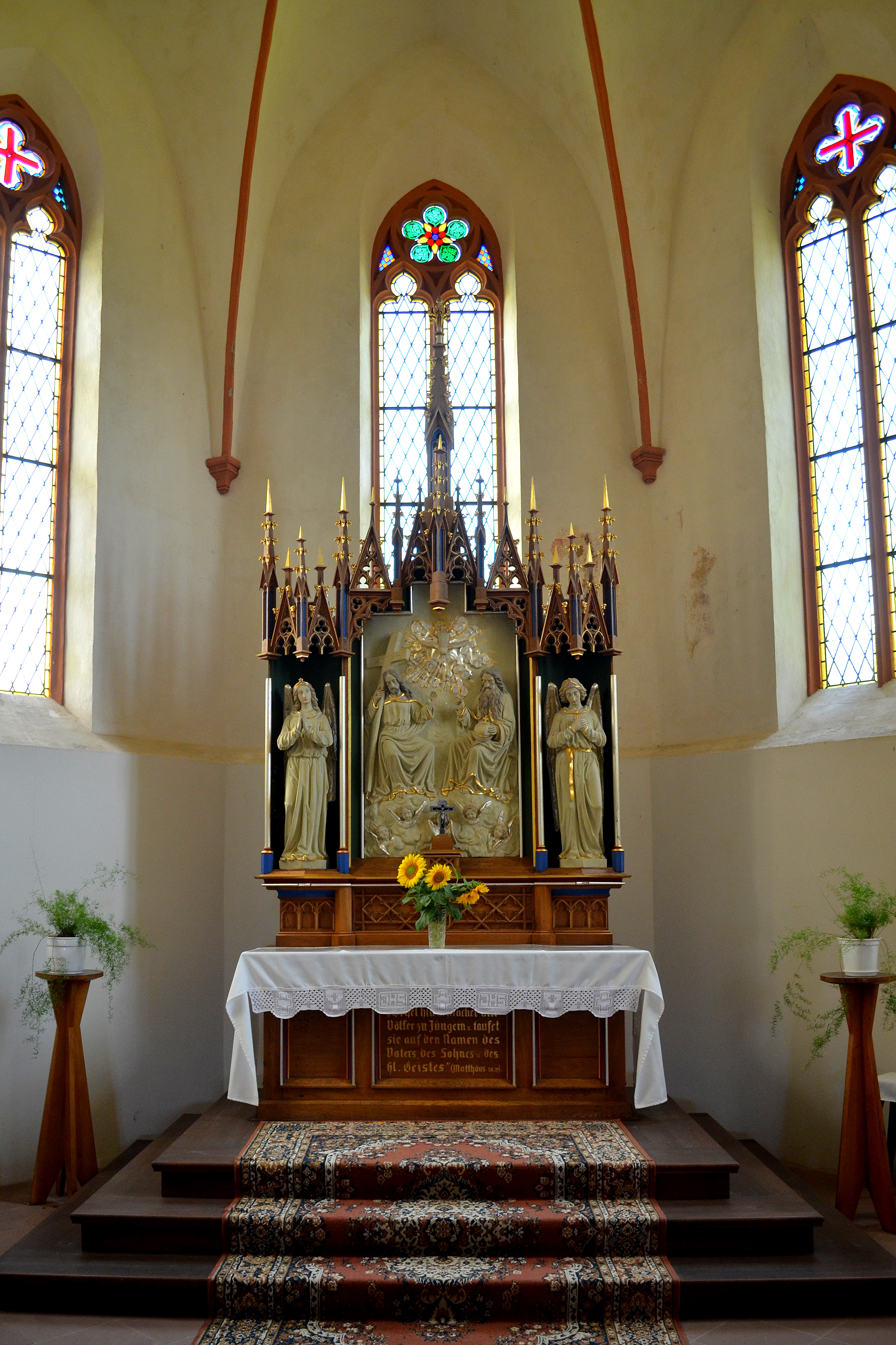 Oberfell, Bleidenbergkapel van de Hl. Drievuldigheid, altaar